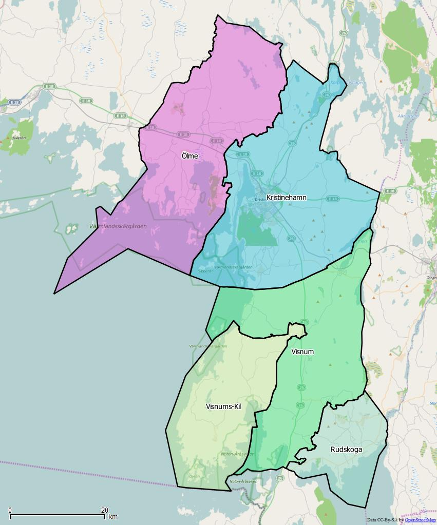 Distriktsindelningen i Kristinehamns kommun World file: 108.10947379626092868 0 0 -108.10947379626092868 1514758.00122919911518693 8289974.36013653222471476